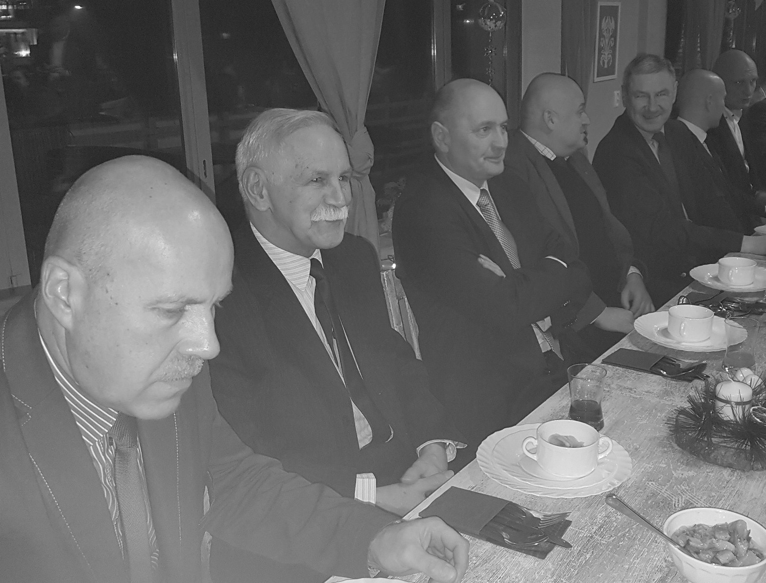 KS Spójnia, Gutowski, Wiśniewski